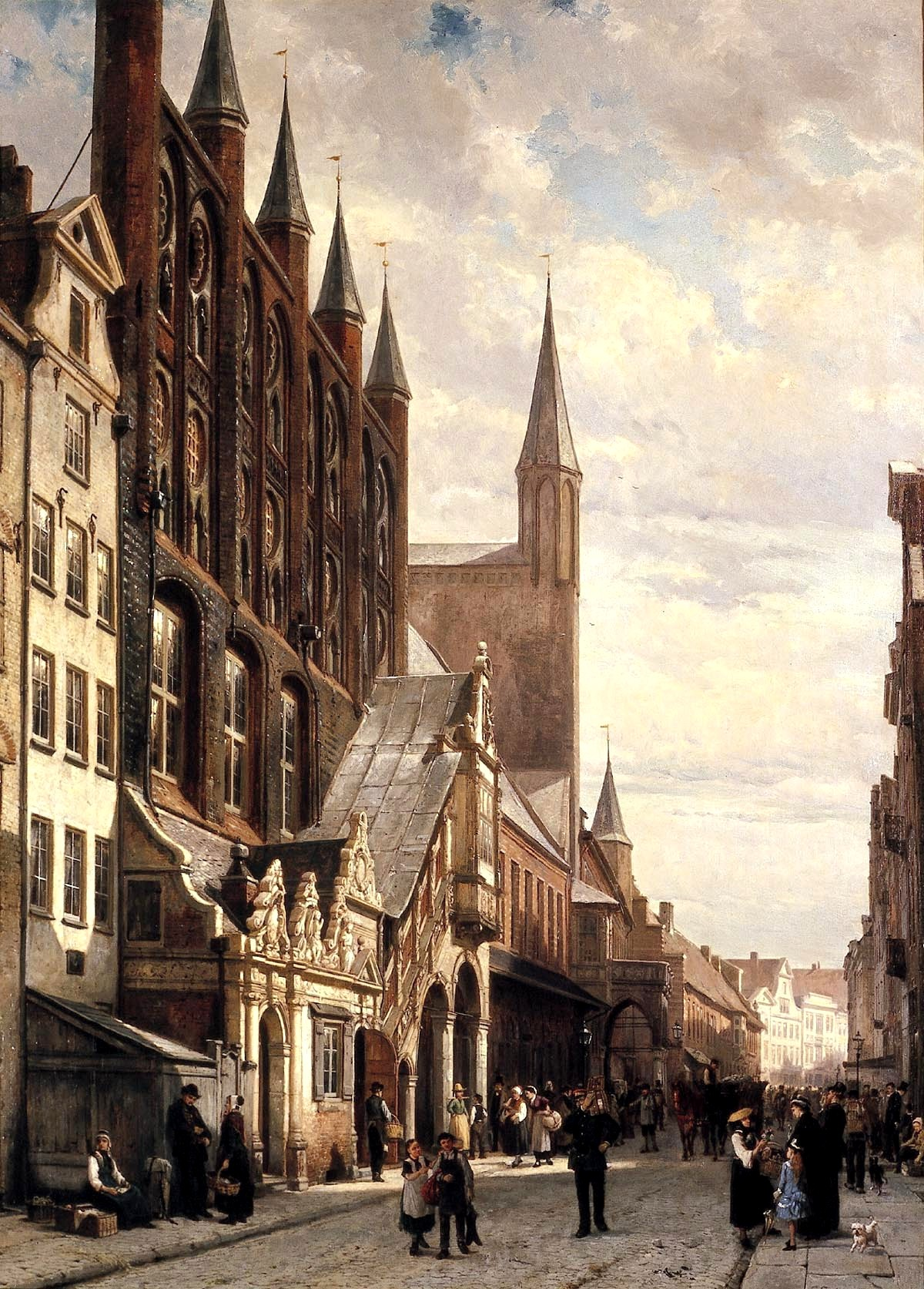 Raadhuis te Lübeck